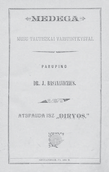 Jonas Basanavičius' book: Medega musu tautiszkai vaistininkystai